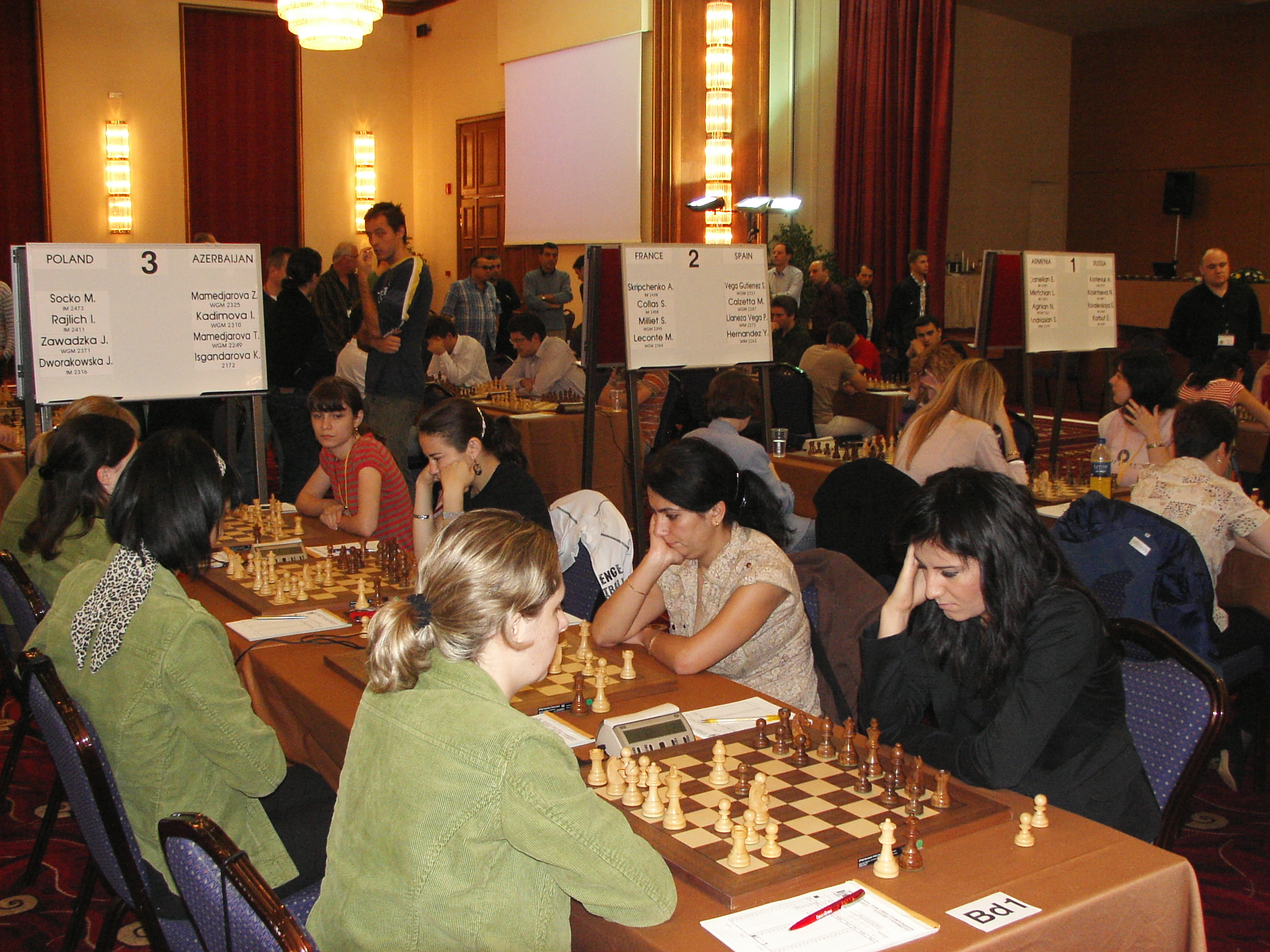 Azerbaijani Grandmasters Khayala Isgandarova, Turkan Mamedyarova, Ilaha Kadimova, and Zeinab Mamedyarova at EuroChess 2007.